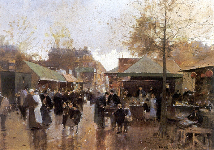 "Le marché aux puces, Porte de Clignancourt" by French painter and engraver Luigi Loir (1845-1916). Oil on canvas.